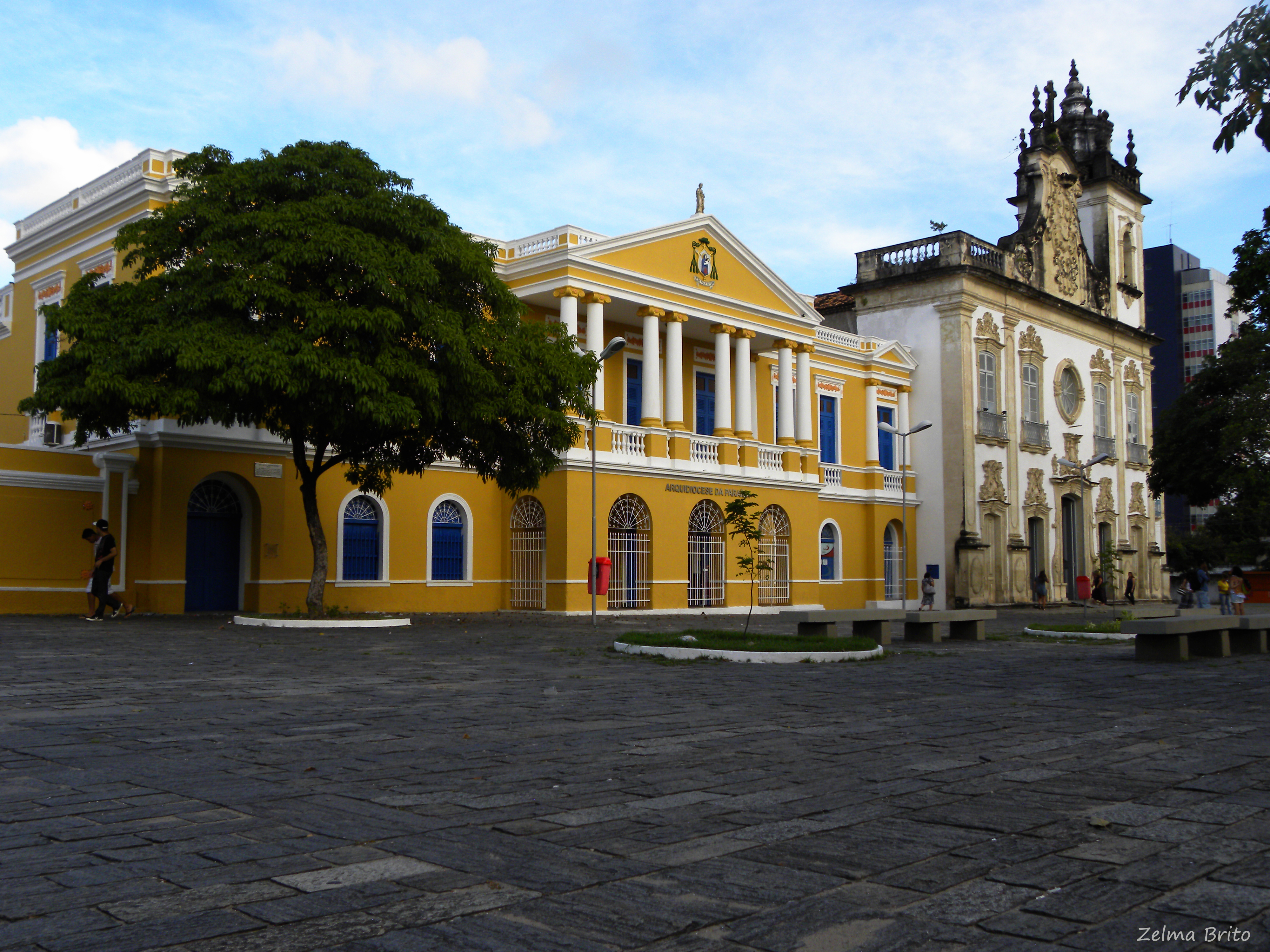 Palácio do Bispo e Igreja N. S. do Carmo